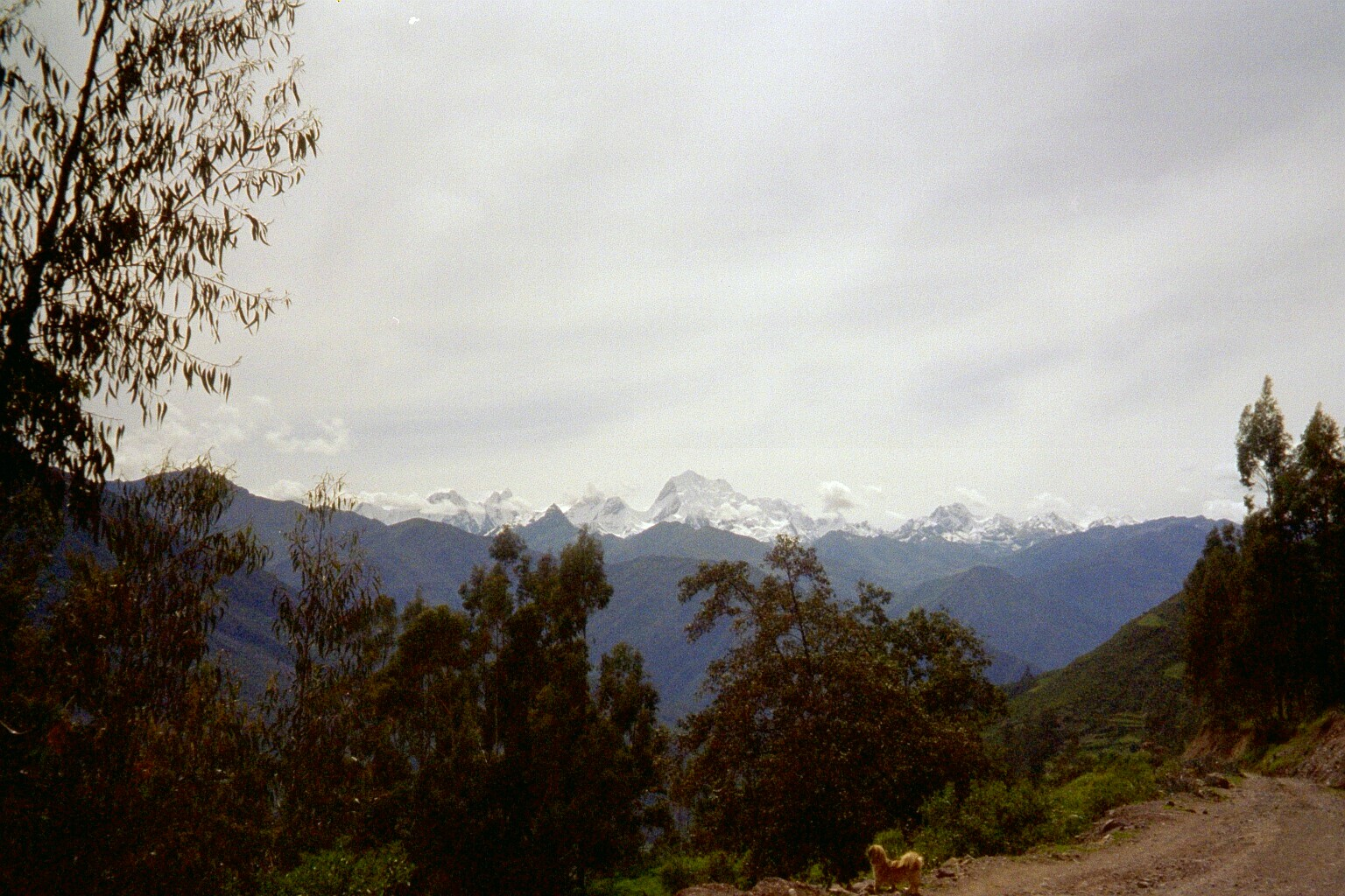 Cordillera Huayhuash in Ancash/Peru mit dem Yerupaja Januar 2005 von Uta Freund